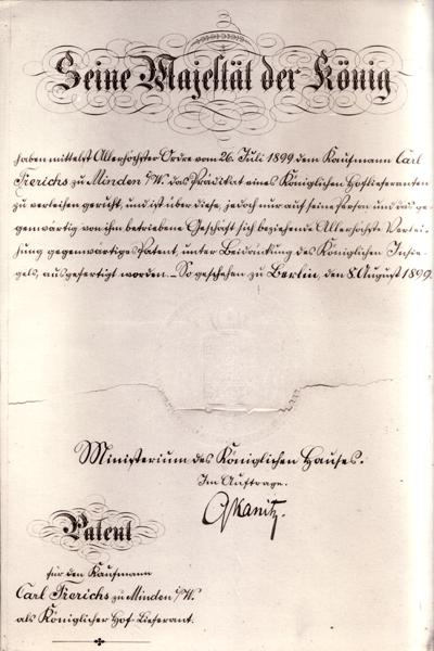 Patent des Hoflieferanten Carl Frerichs aus Minden, damals Provinz Westfalen in Preußen, heute Nordrhein-Westfalen.